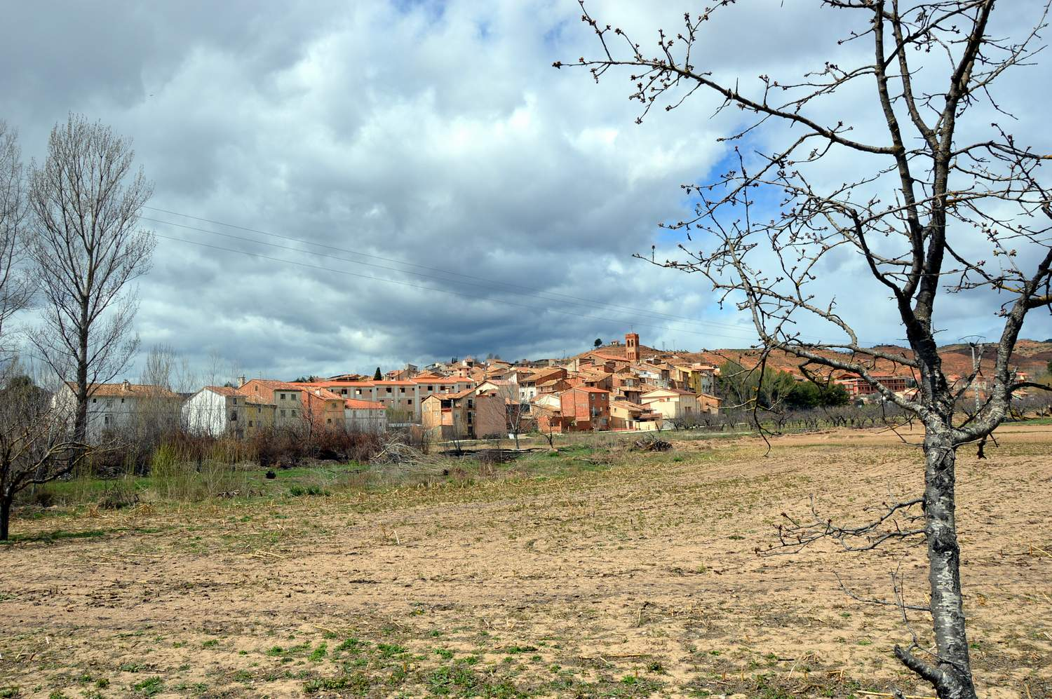 Vista general de Torrebaja en invierno, desde el camino del Rento.